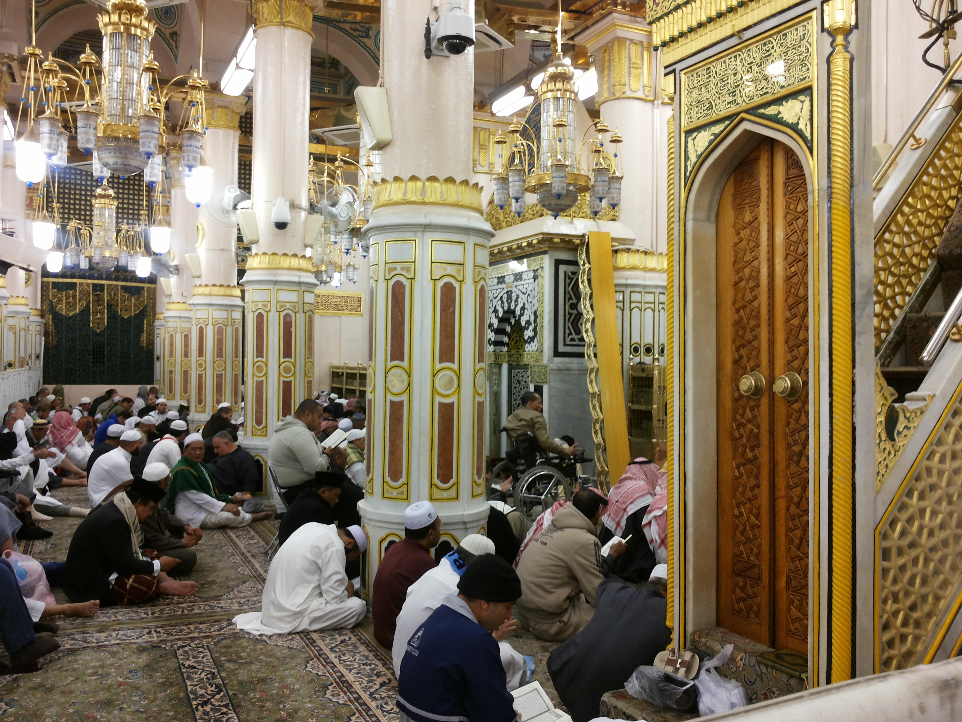 Пайғамбар (с.а.с.) мешіті, жәннатқа кіретін орын